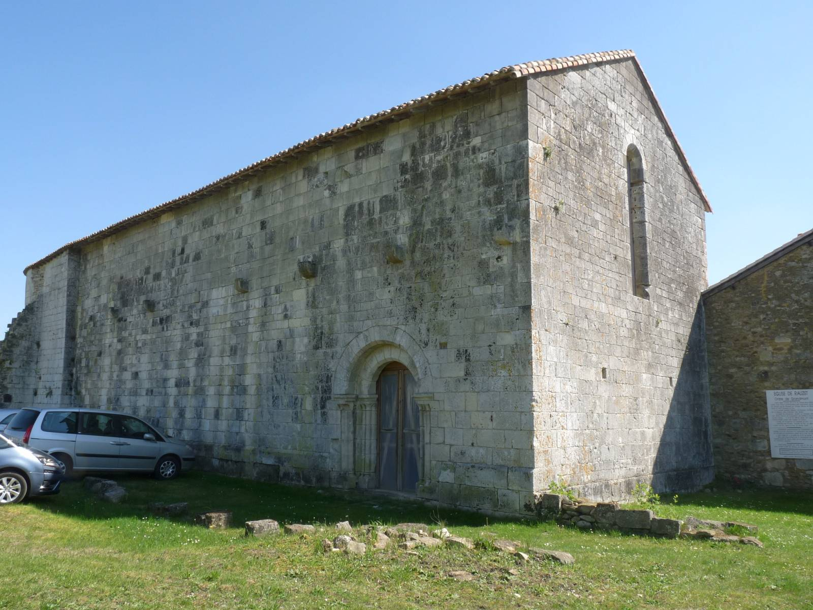 Eglise de Rozet, Combiers, Charente, France